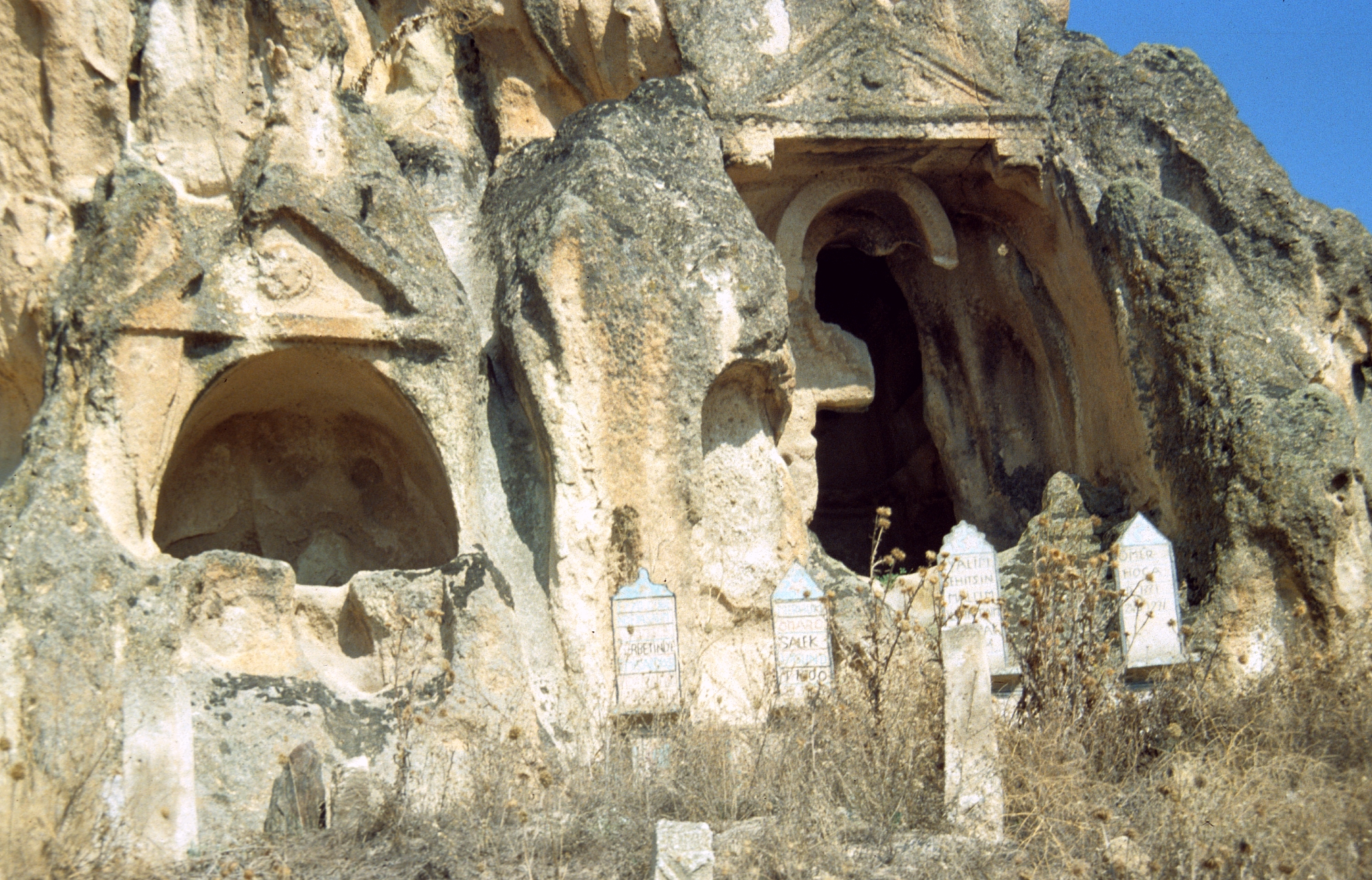 Römische Felsengräber über einem Friedhof im Dorf Ayazin bei Afyon, Zentraltürkei